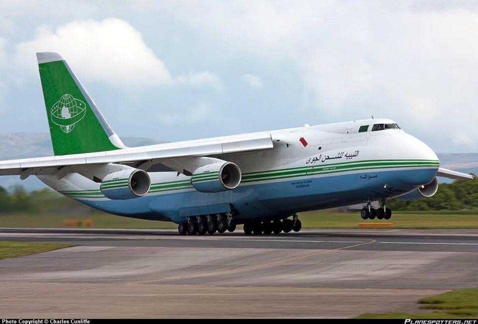 طائرة انطونوف 124-100 تابعة للشركة الليبية للشحن الجوي اثناء الاقلاع ..